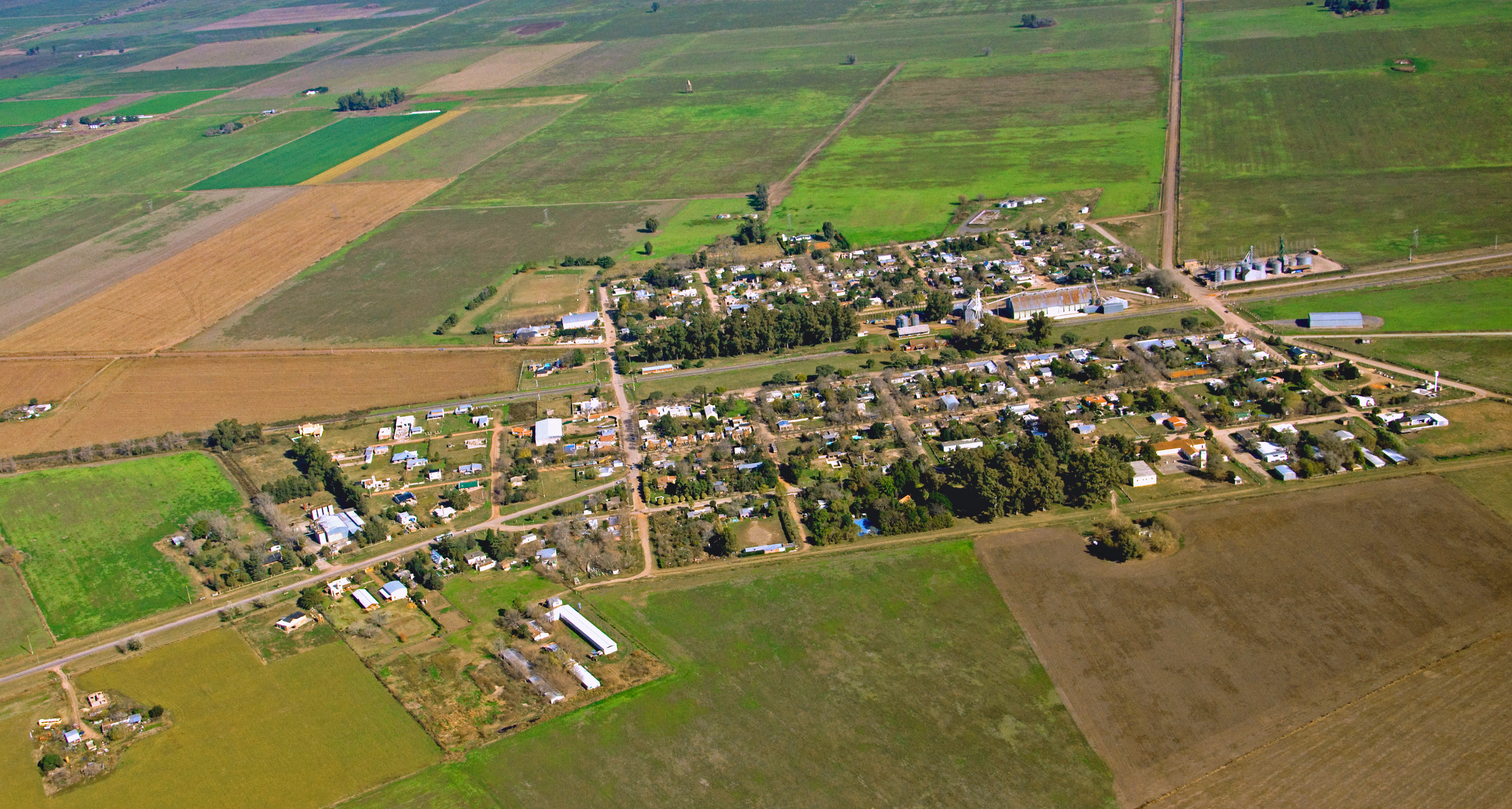 Imagen aérea Aldao en el año 2010